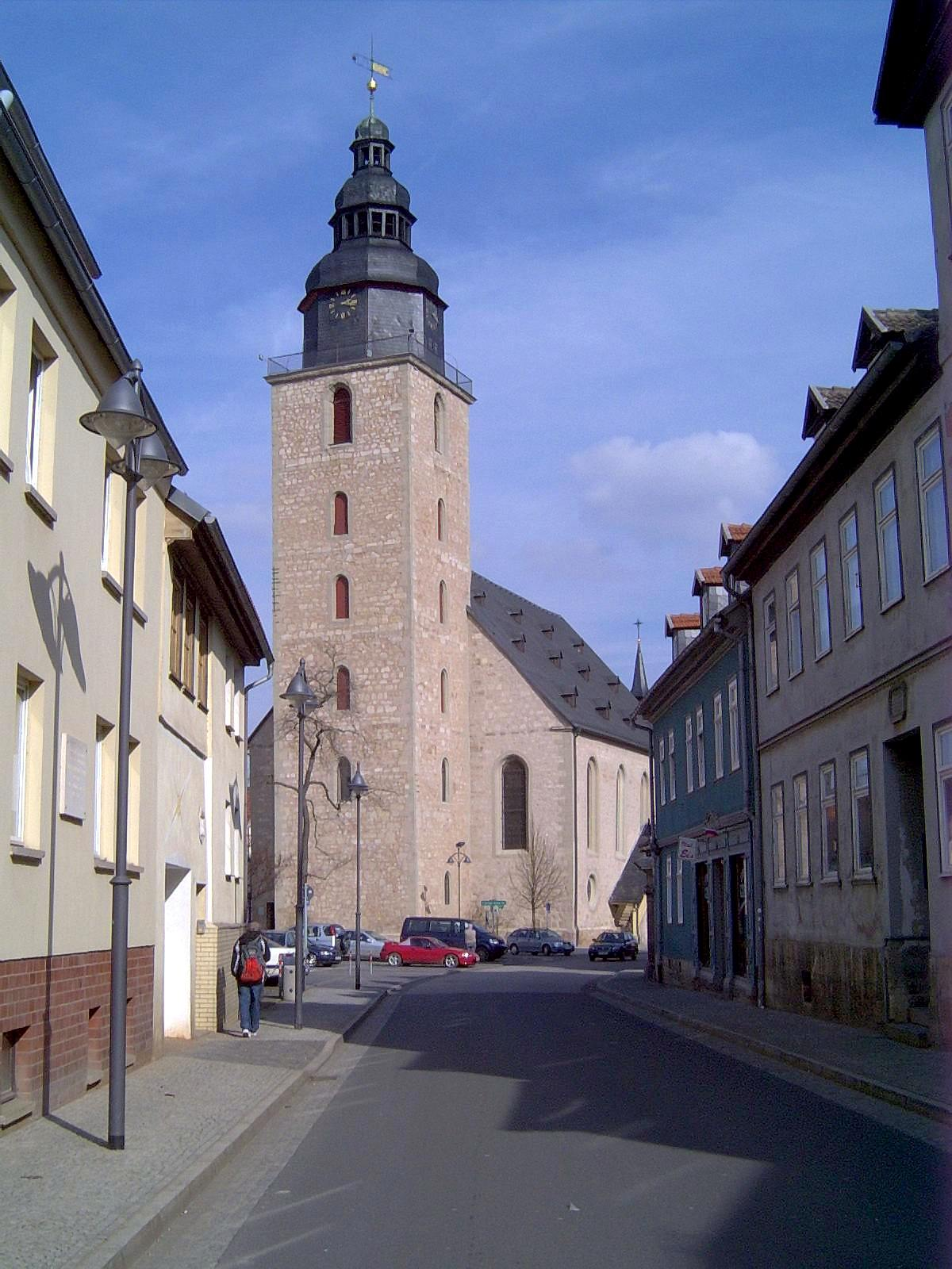 Trinitatiskirche Sondershausen. Blick von Westen.